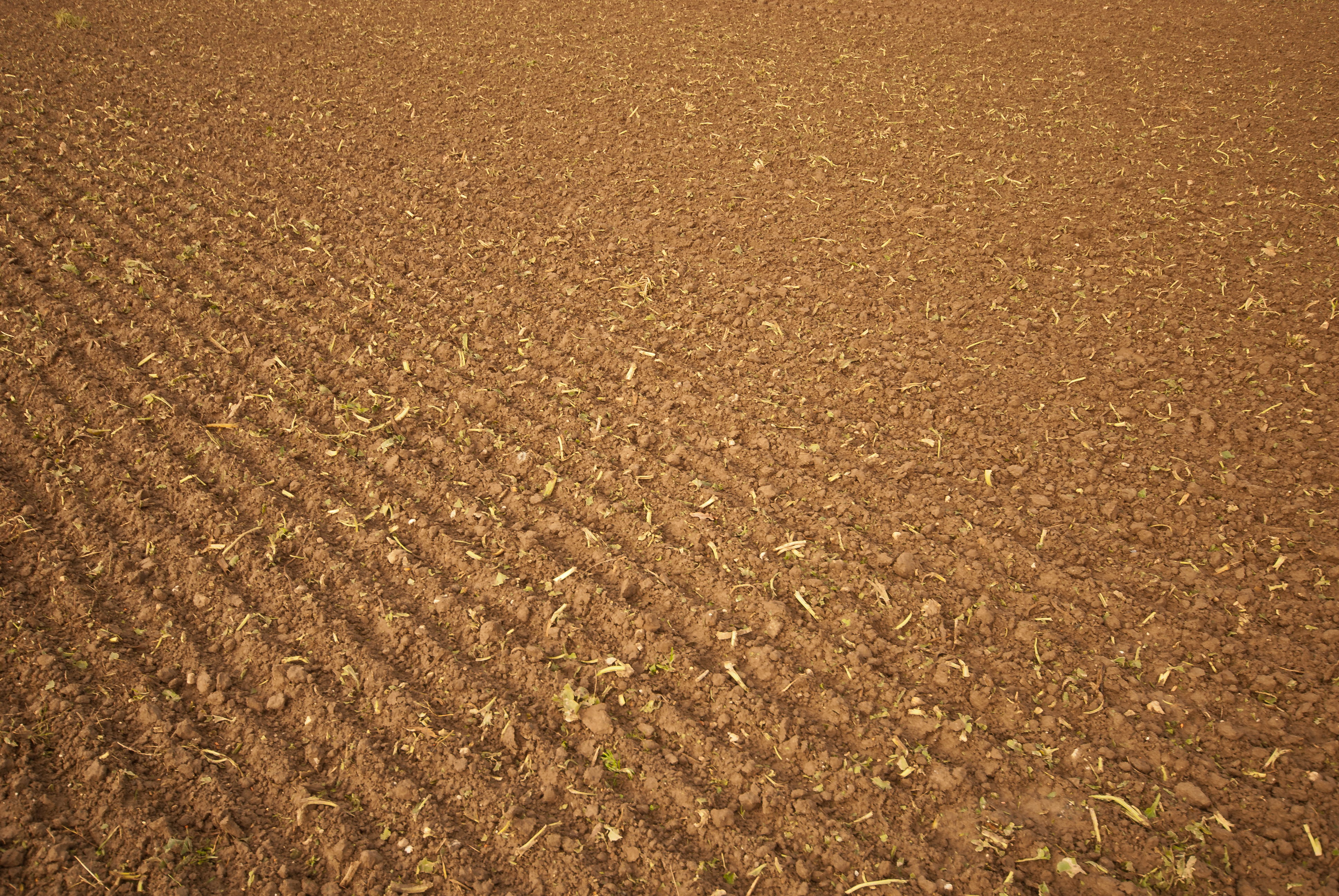 Direktsaat von Winterweizen in ein abgeerntes Zuckerrübenfeld der Geilenkirchener Lehmplatte. Saatzeitpunkt dritte Novemberdekade. Zum Zustand desselben Feldes nach dem Auflaufen des Weizens, rund einen Monat später, siehe .